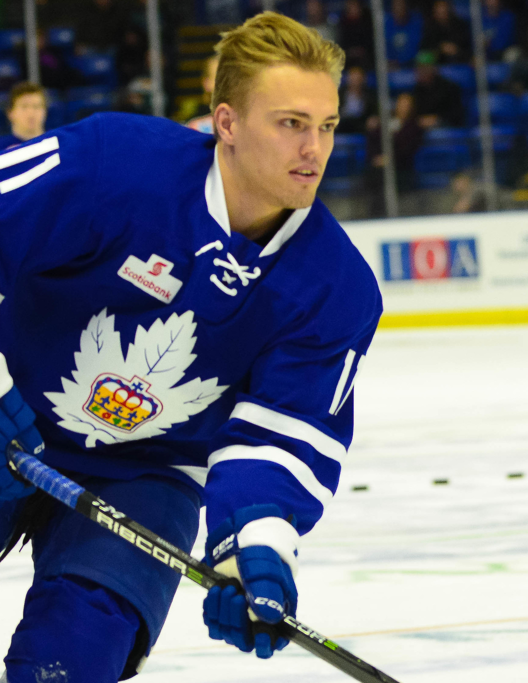 (Bryan Peck/ AHL)